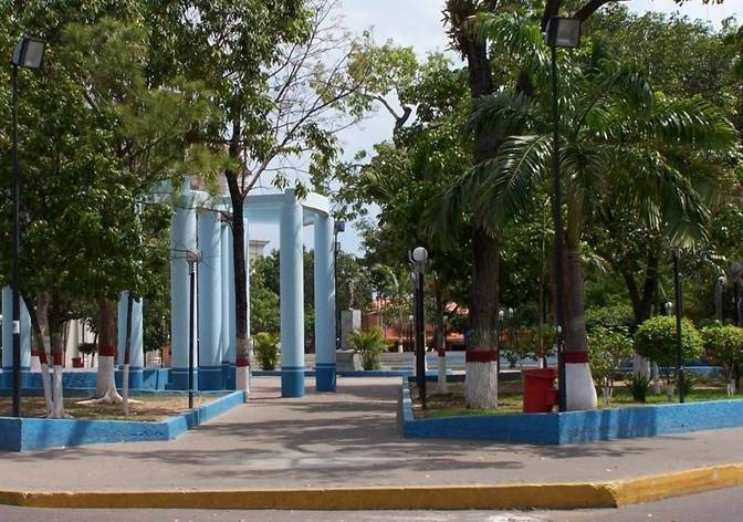 Plaza Bolivar Square